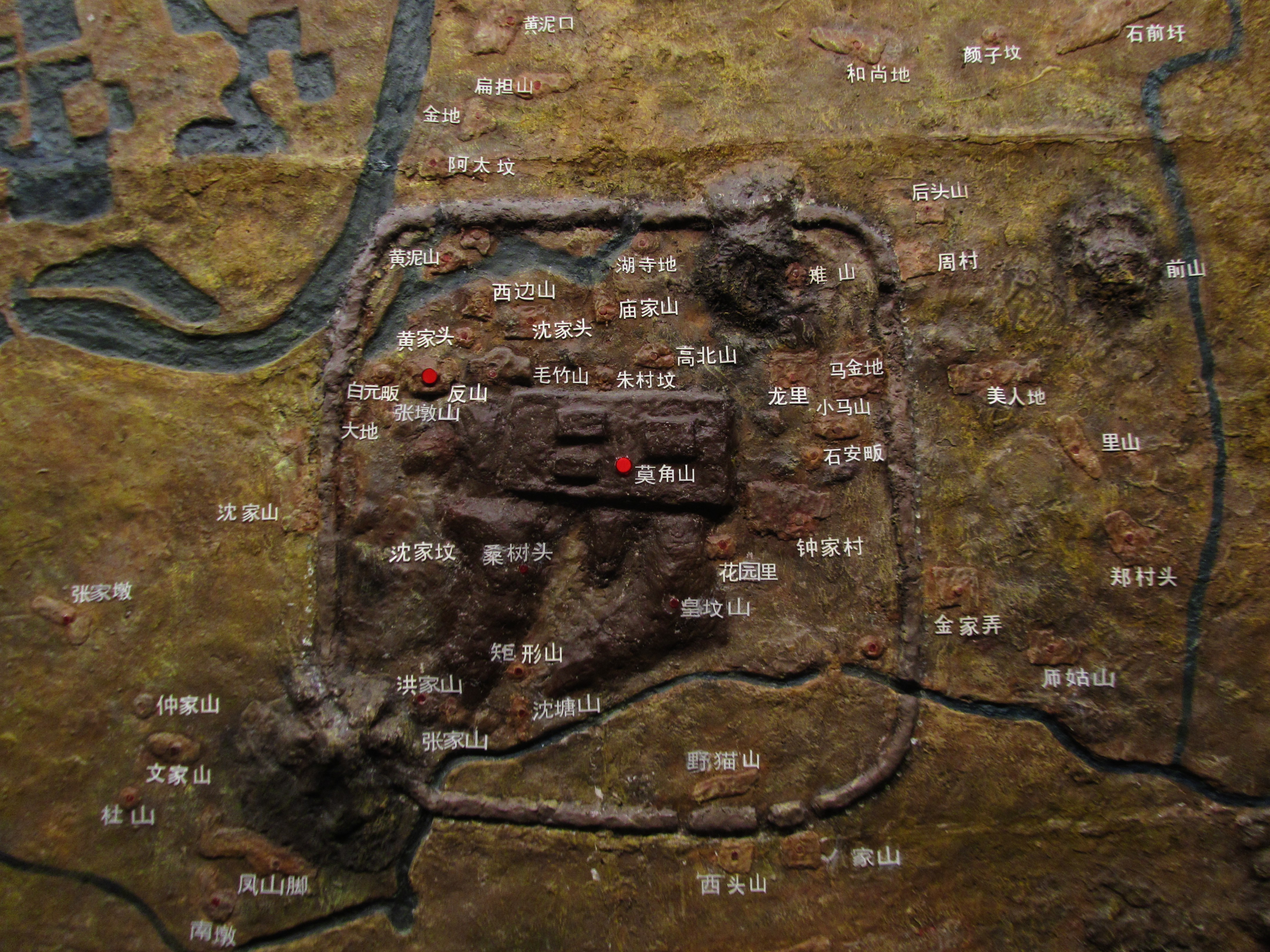 良渚古城模型，陈列于良渚博物院。